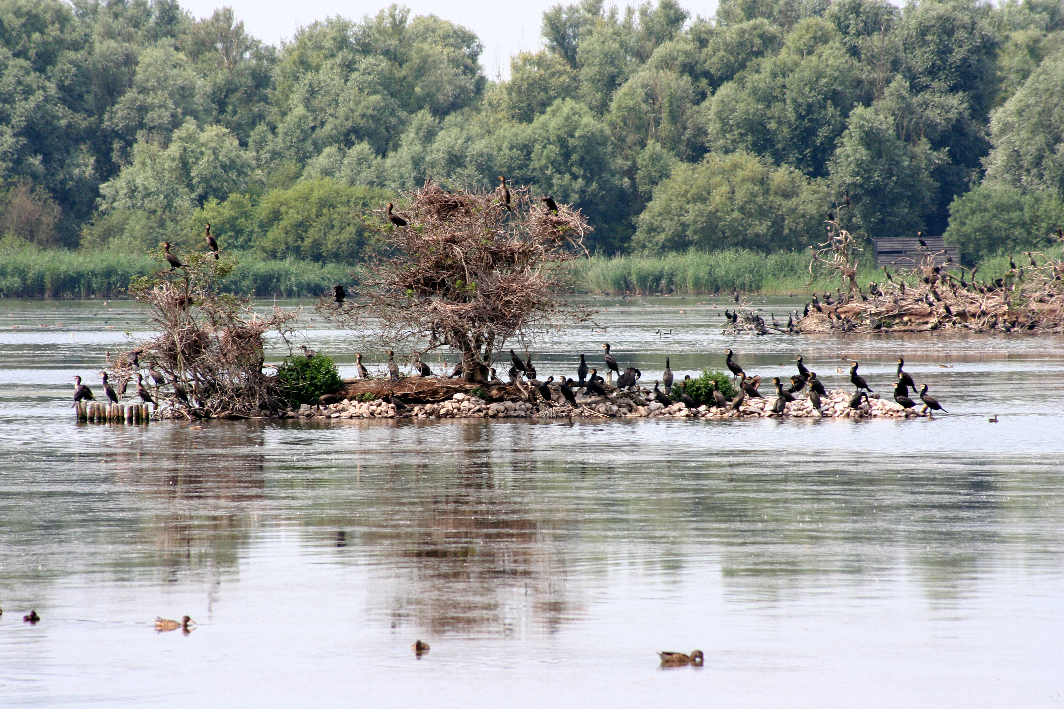 Eiland in de Lepelaarplassenmet aalscholvers